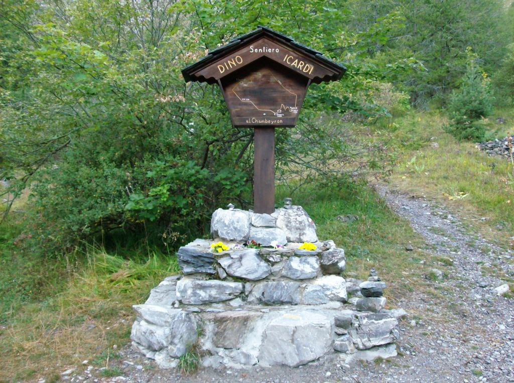 Sentiero Dino Icardi (Valle Maira) - la palina indicatrice posta ad inizio sentiero, con l'indicazione schematica del percorso